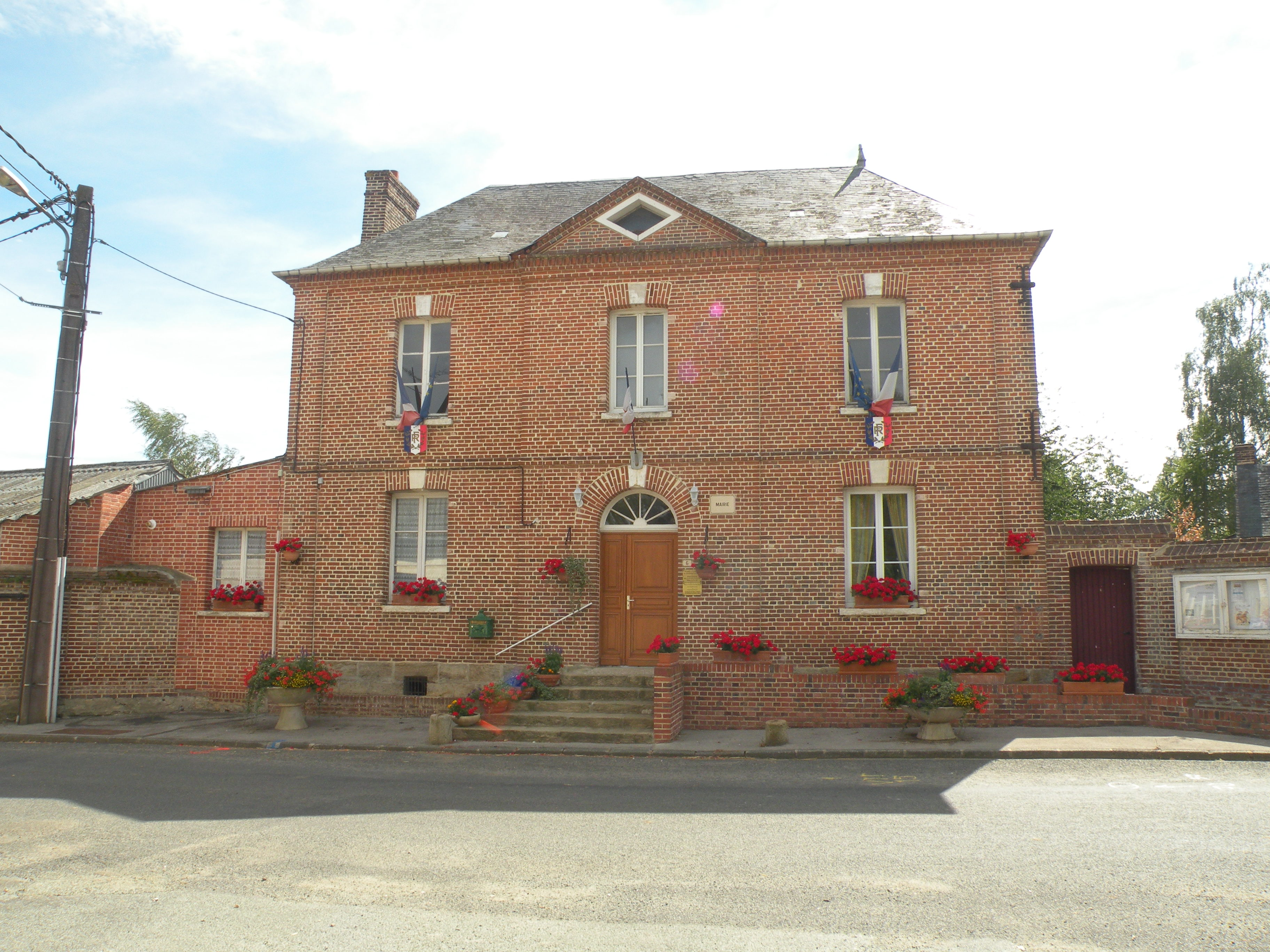 Grémévillers mairie